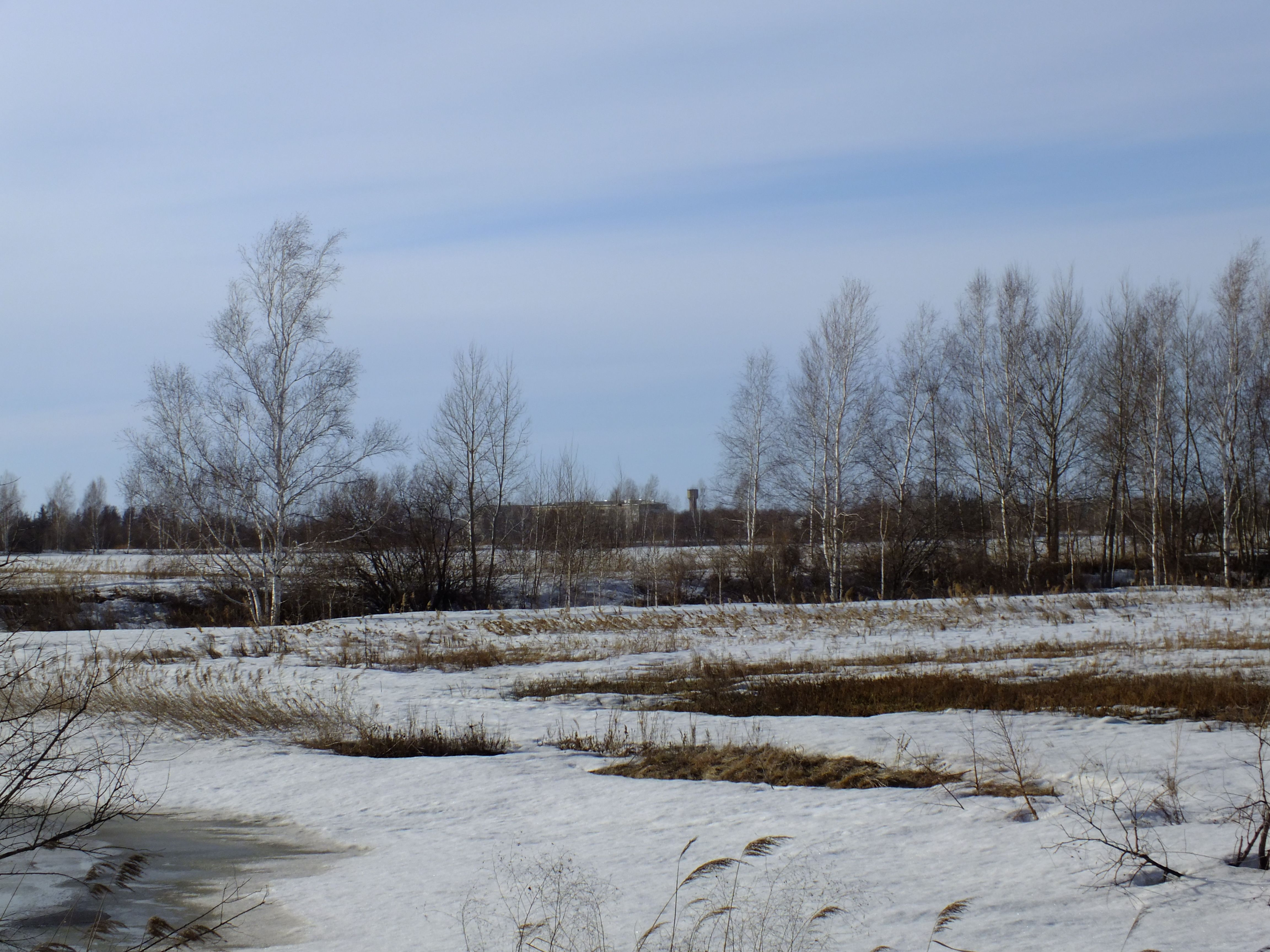 Волочаевка-2 вид с автотрассы Амур